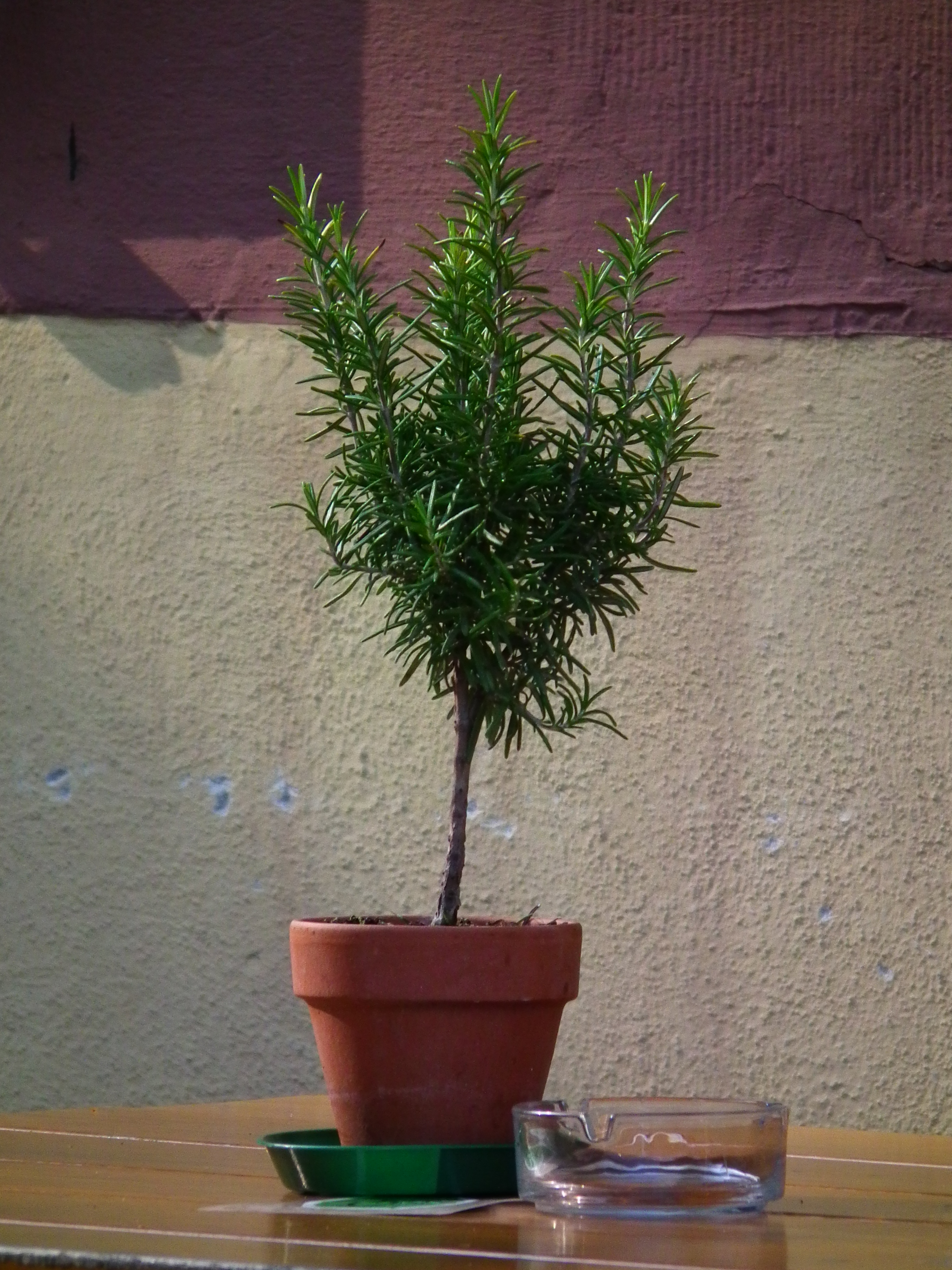 Rosmarin (Rosmarinus officinalis) als Tischdekoration